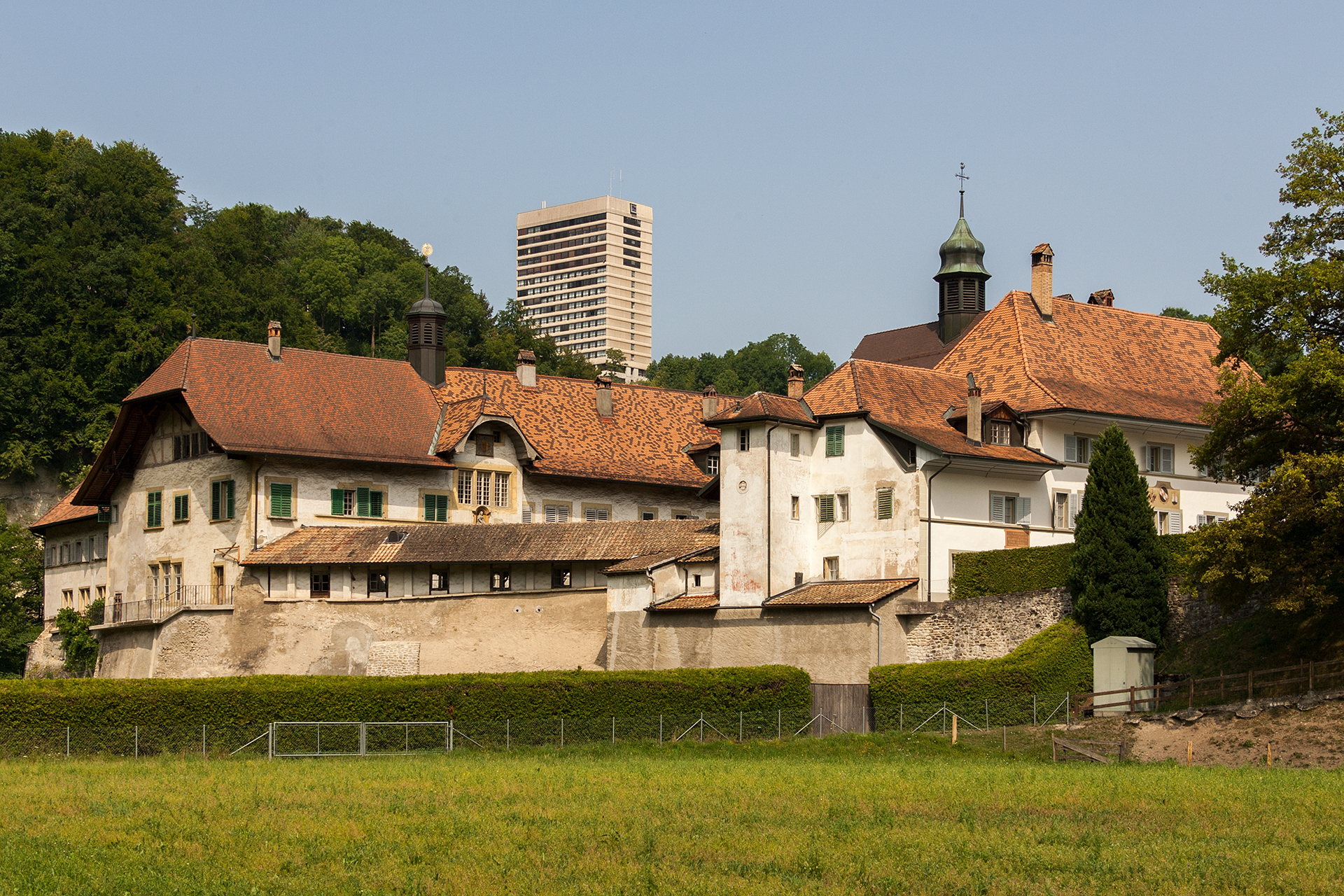 Kloster Magerau in Fribourg